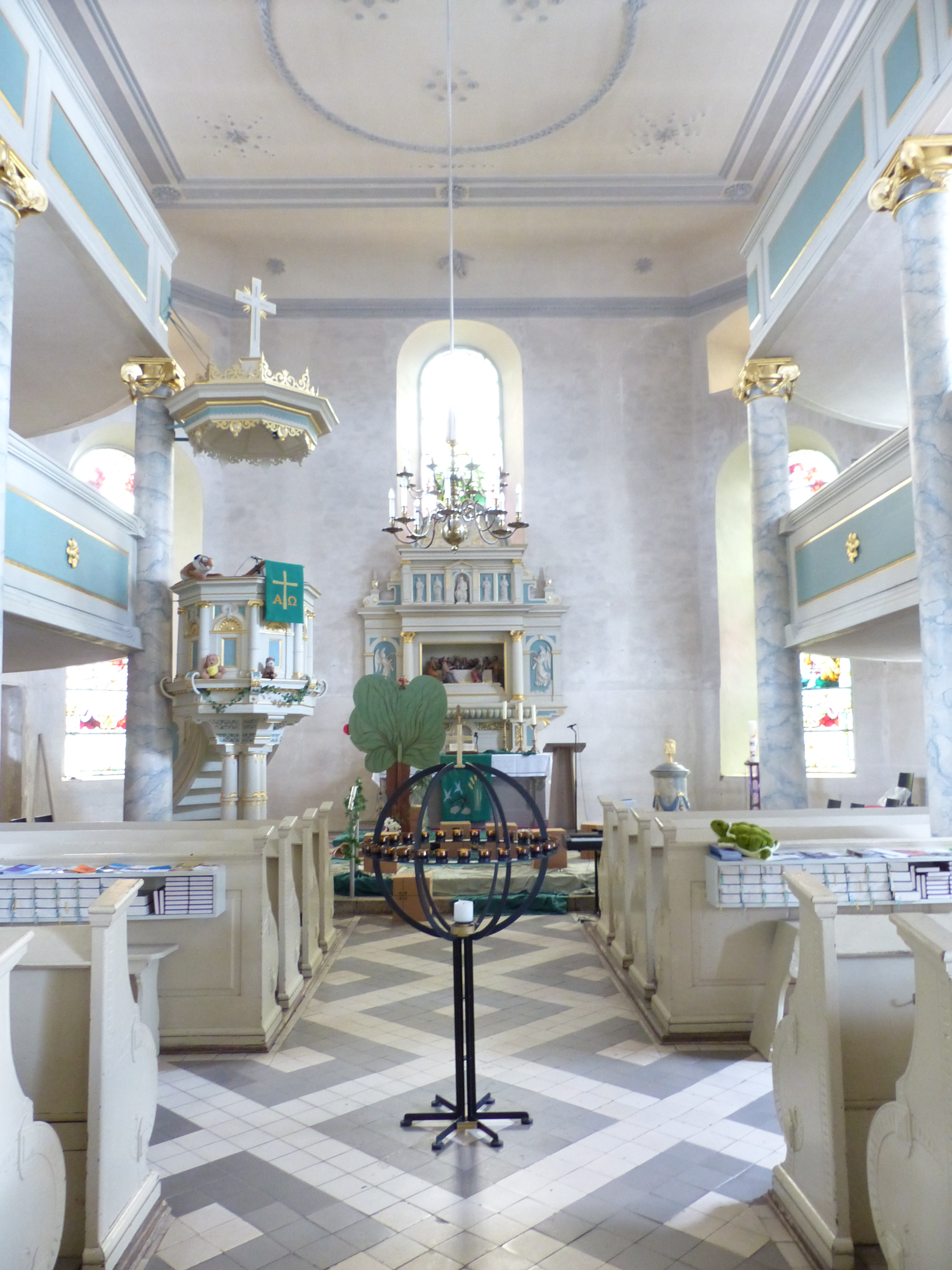 Innenausstattung der Marienkirche